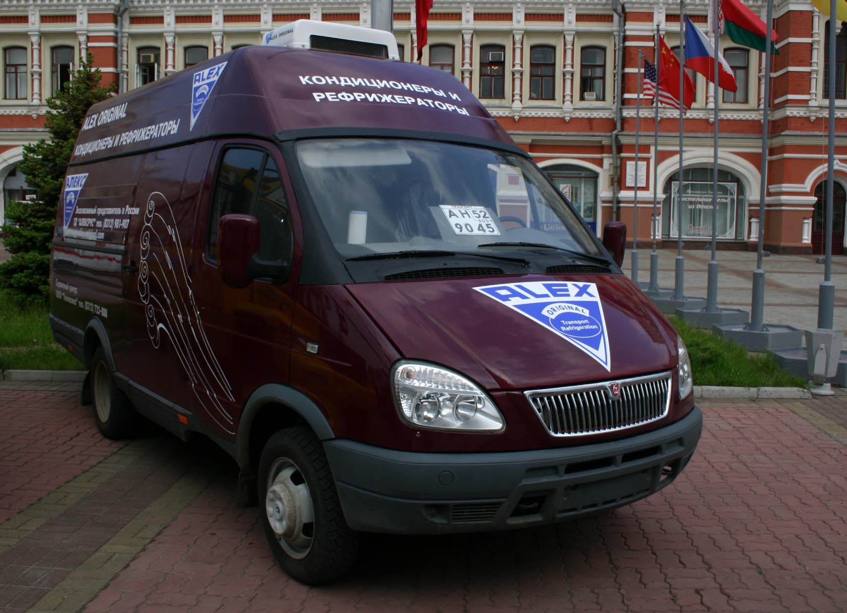 СемАР-3234 фургон на Автофорум-2005 (Нижний Новгород)